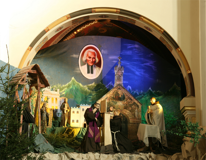 Crib in Katowice Panewniki, Poland (2009)